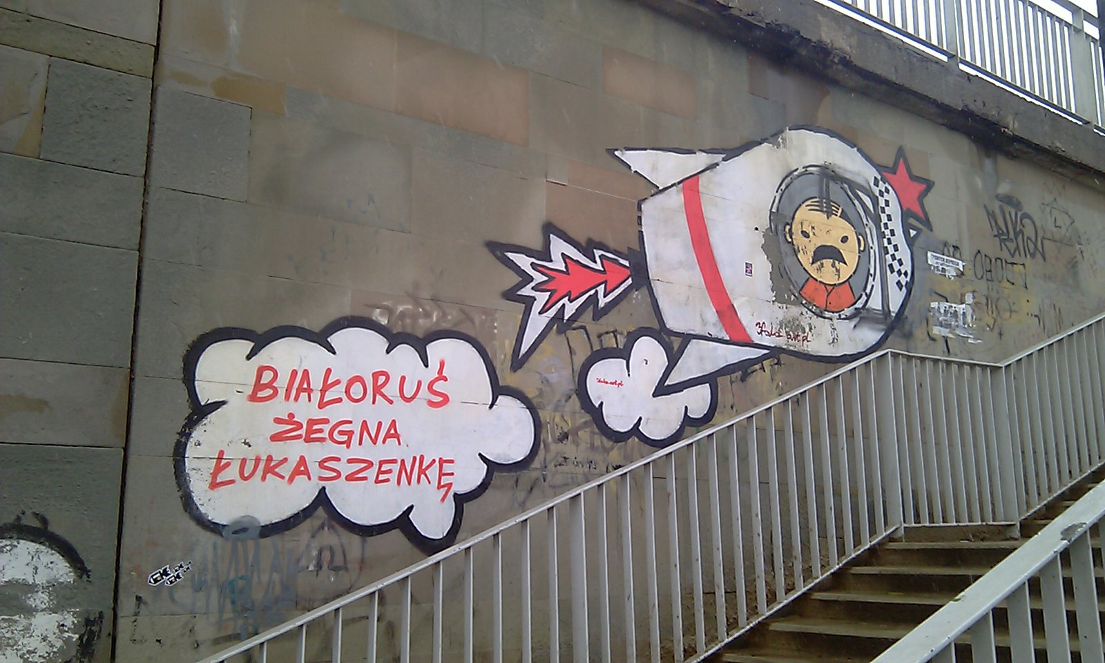 Graffiti przedstawiające Alaksandra Łukaszenkę w rakiecie. Warszawa, przystanek Rozbrat, 20 stycznia 2011 roku o godz. 10.15.